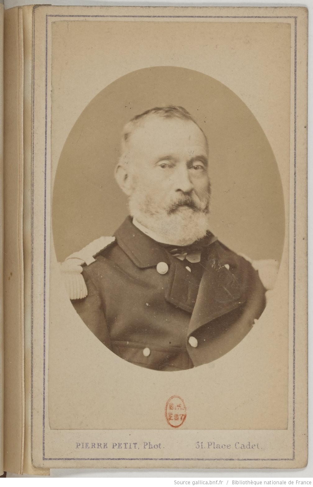 Jacques Léon Clément-Thomas